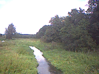 река Шаловка в Обухово